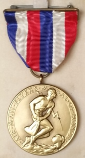 medal